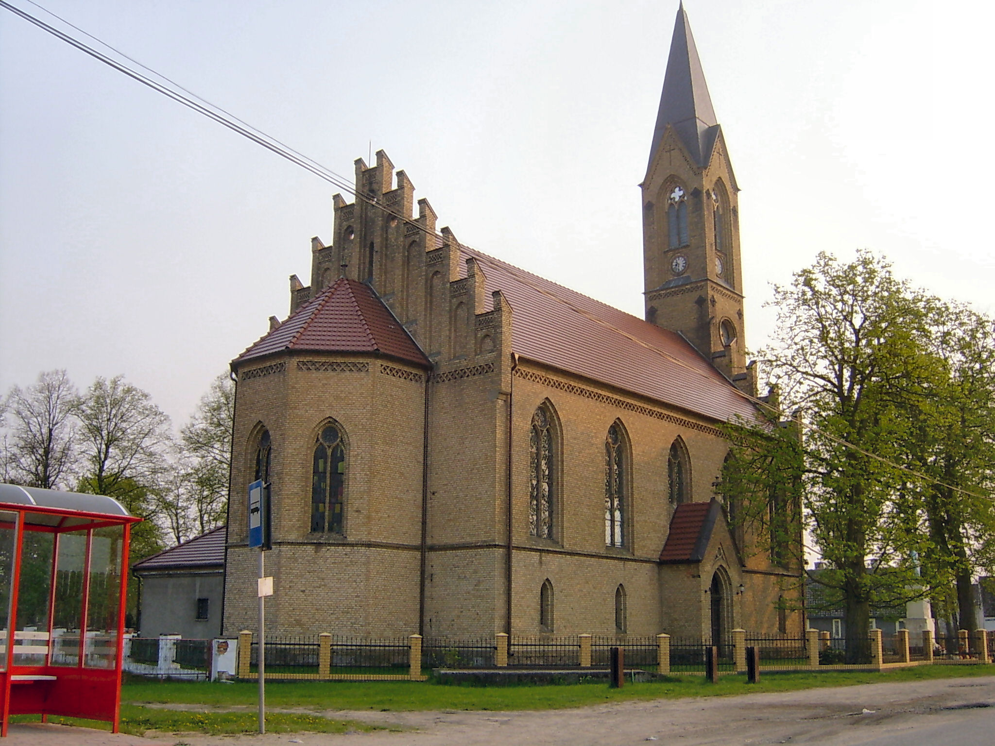 Trzebicz - kościół parafialny p.w. Najśw. Serca Pana Jezusa z 1879 r. (zabytek nr rejestr. L-52)